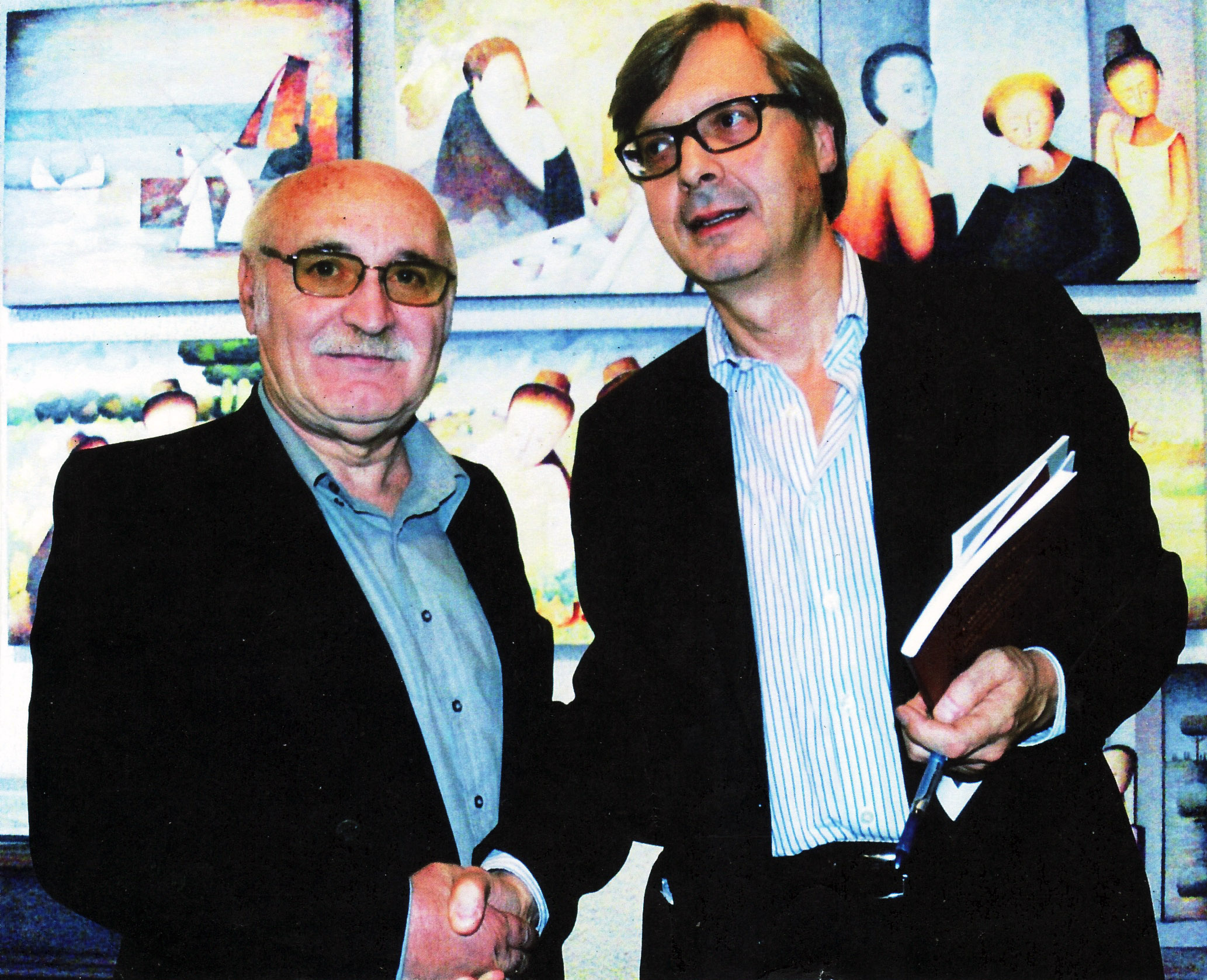 Il pittore Battista Mombrini con il critico d'arte Vittorio Sgarbi